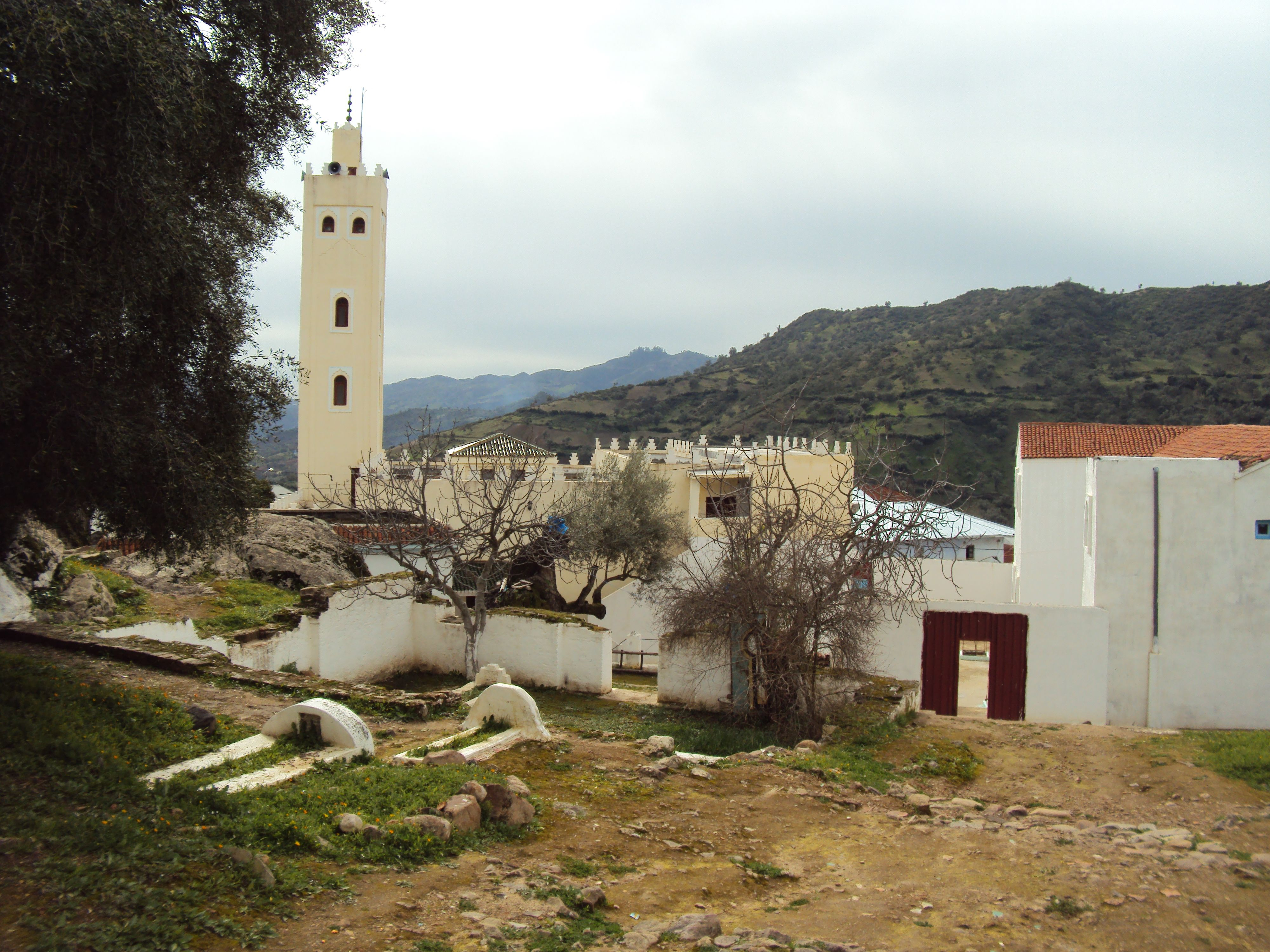 مسجد الحرائق غزاوة العليا